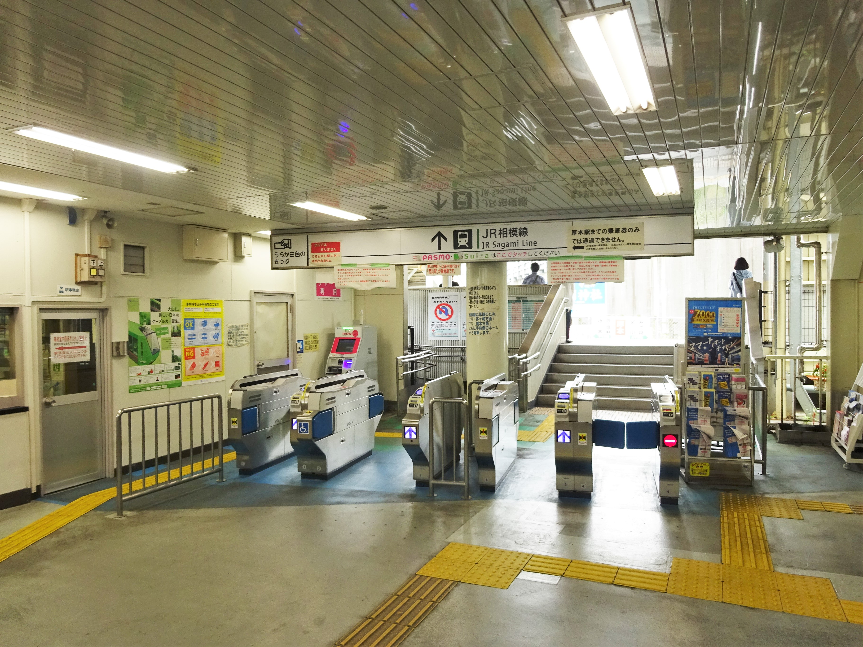 厚木駅連絡改札口（小田急側から撮影）